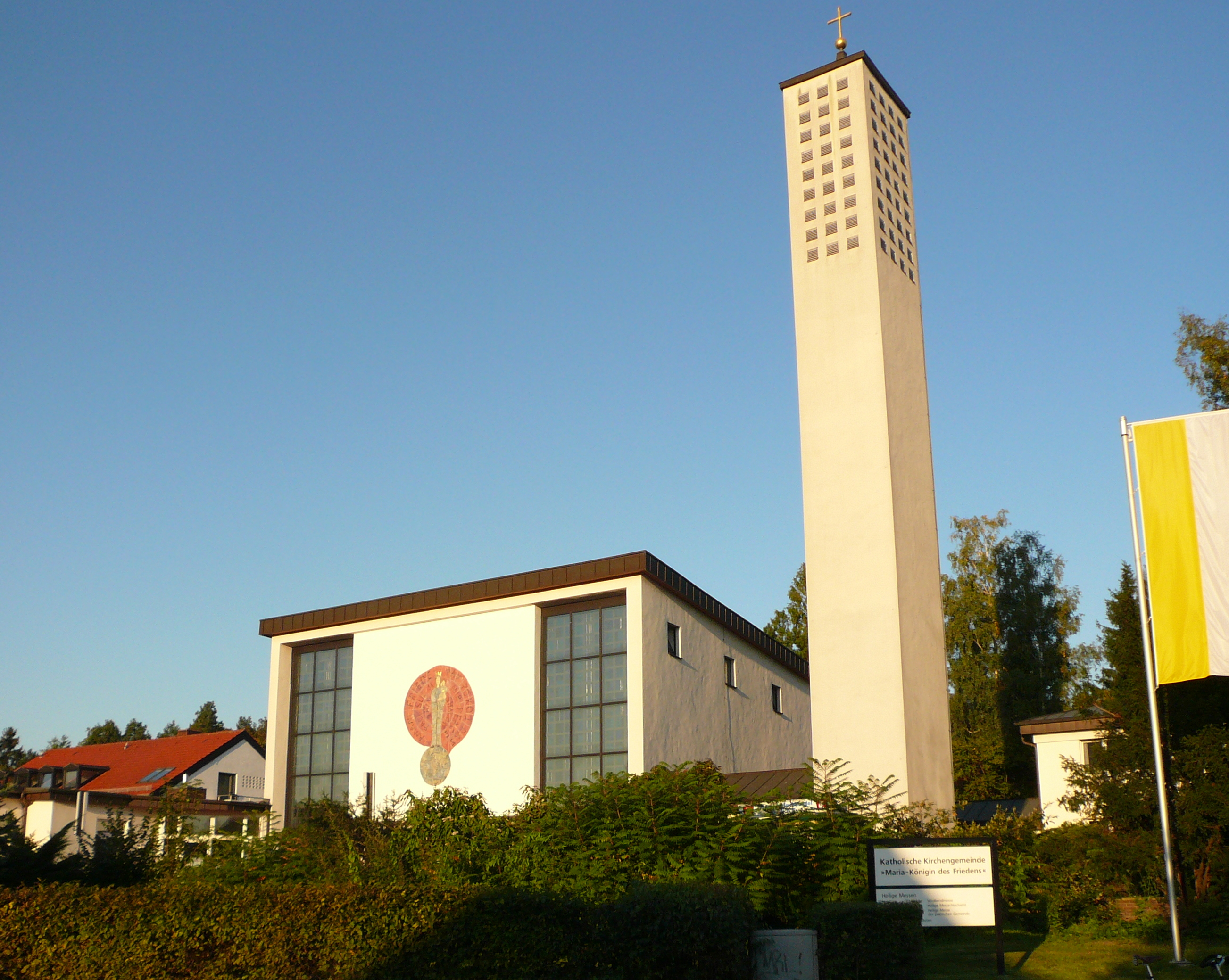 Römisch-katholische Kirche Maria Königin des Friedens in Geismar, Stadt Göttingen, Südniedersachsen. Erbaut 1960-61